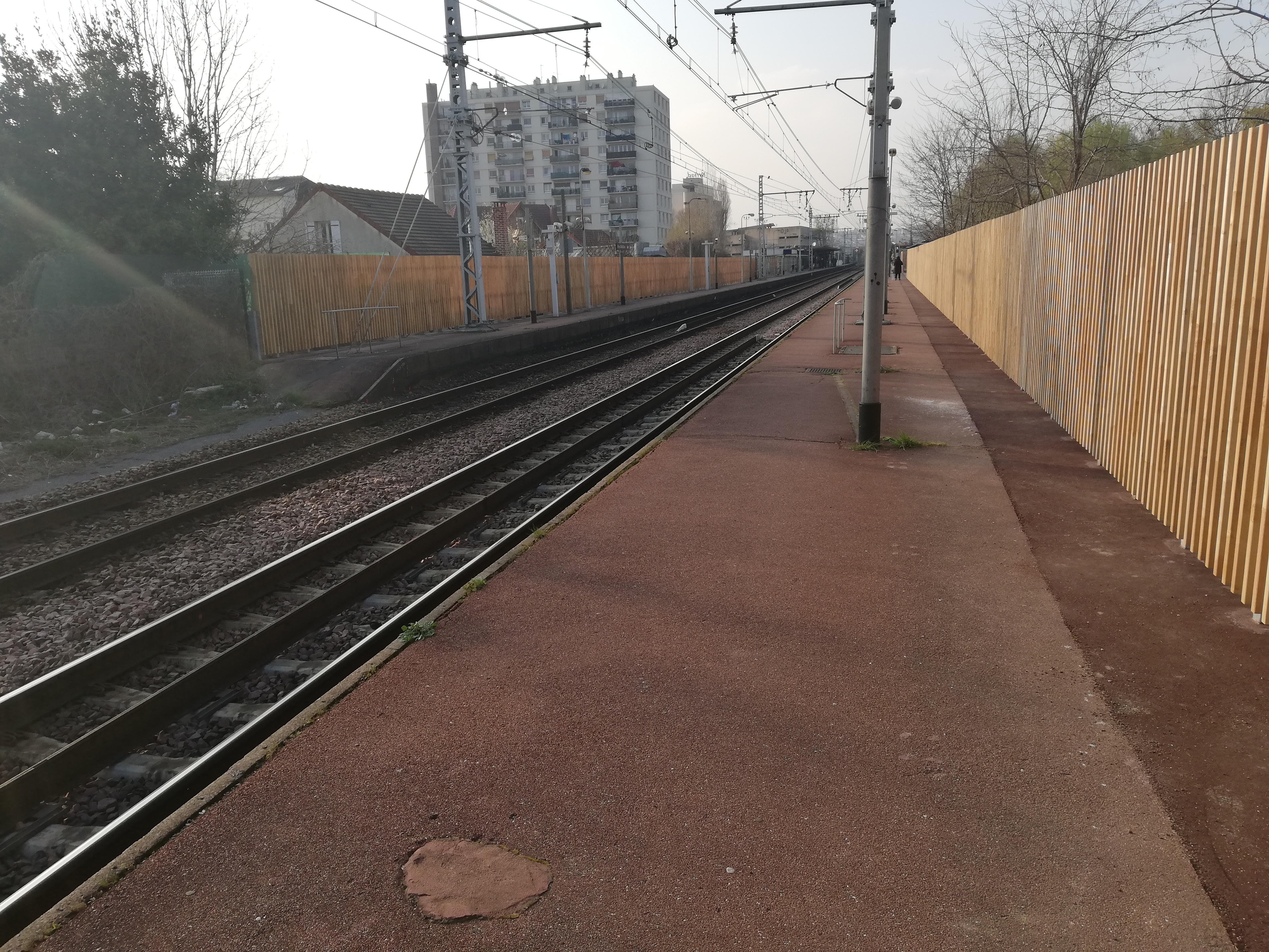 Quais de la gare rénovée de Viry-Châtillon, en 2019.